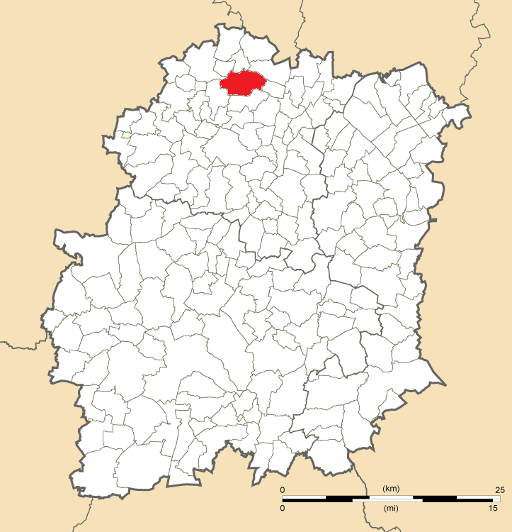 Carte de position de Palaiseau en Essonne.